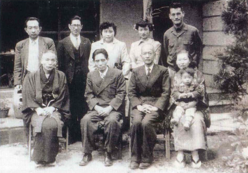 宮城道雄氏来伊記念写真（岡田家で） 前列左：水野佐平、左から２人目：宮城道雄、右から２人目：岡田利兵衛